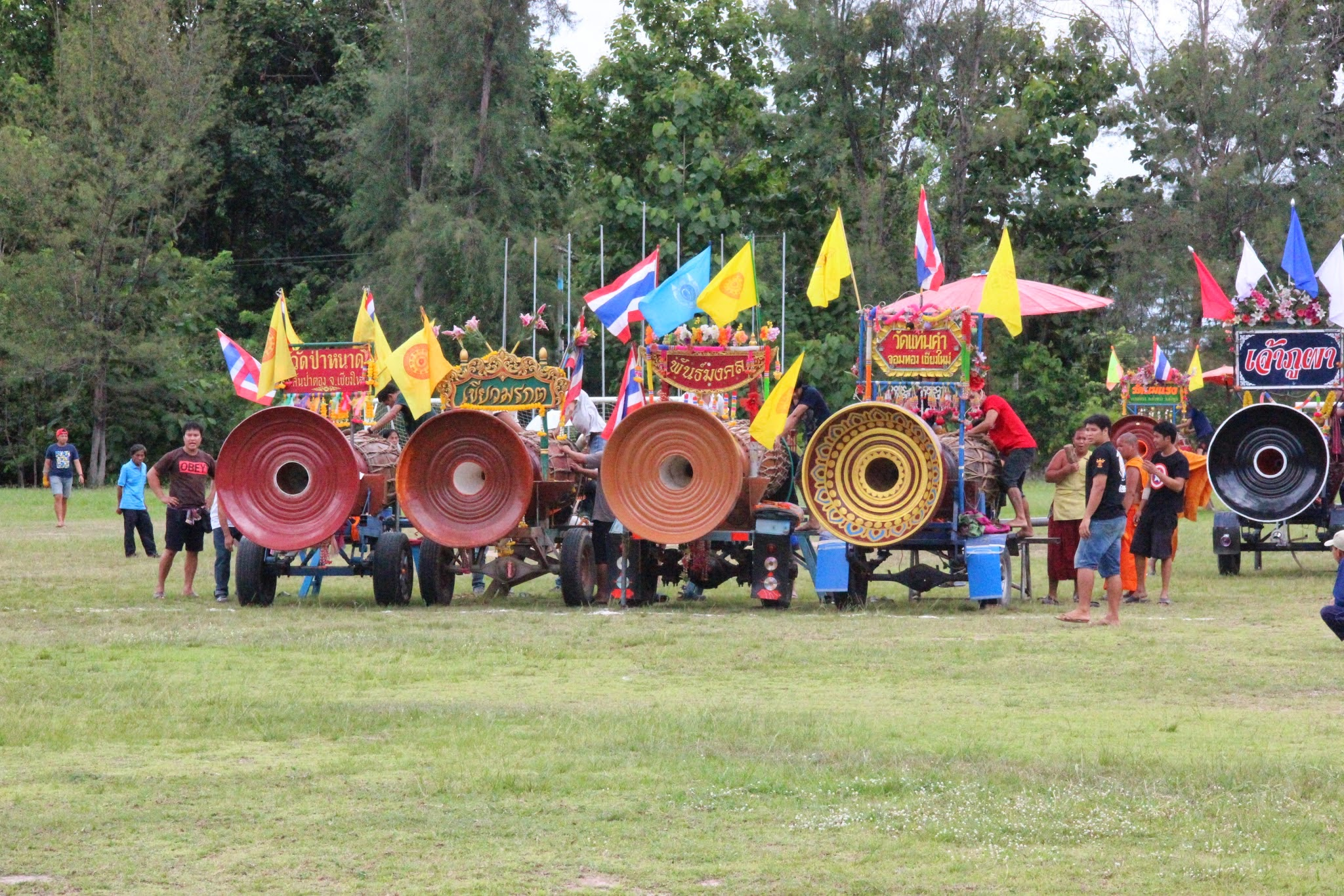 กลองหลวง สถาปนา ส.ว.57